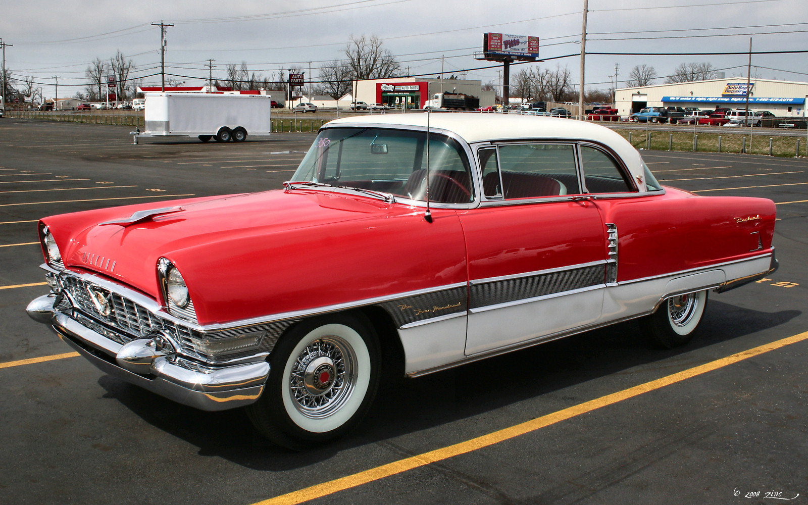 '57 Heaven Museum & Branson/Springfield, MO, March 20, 2008